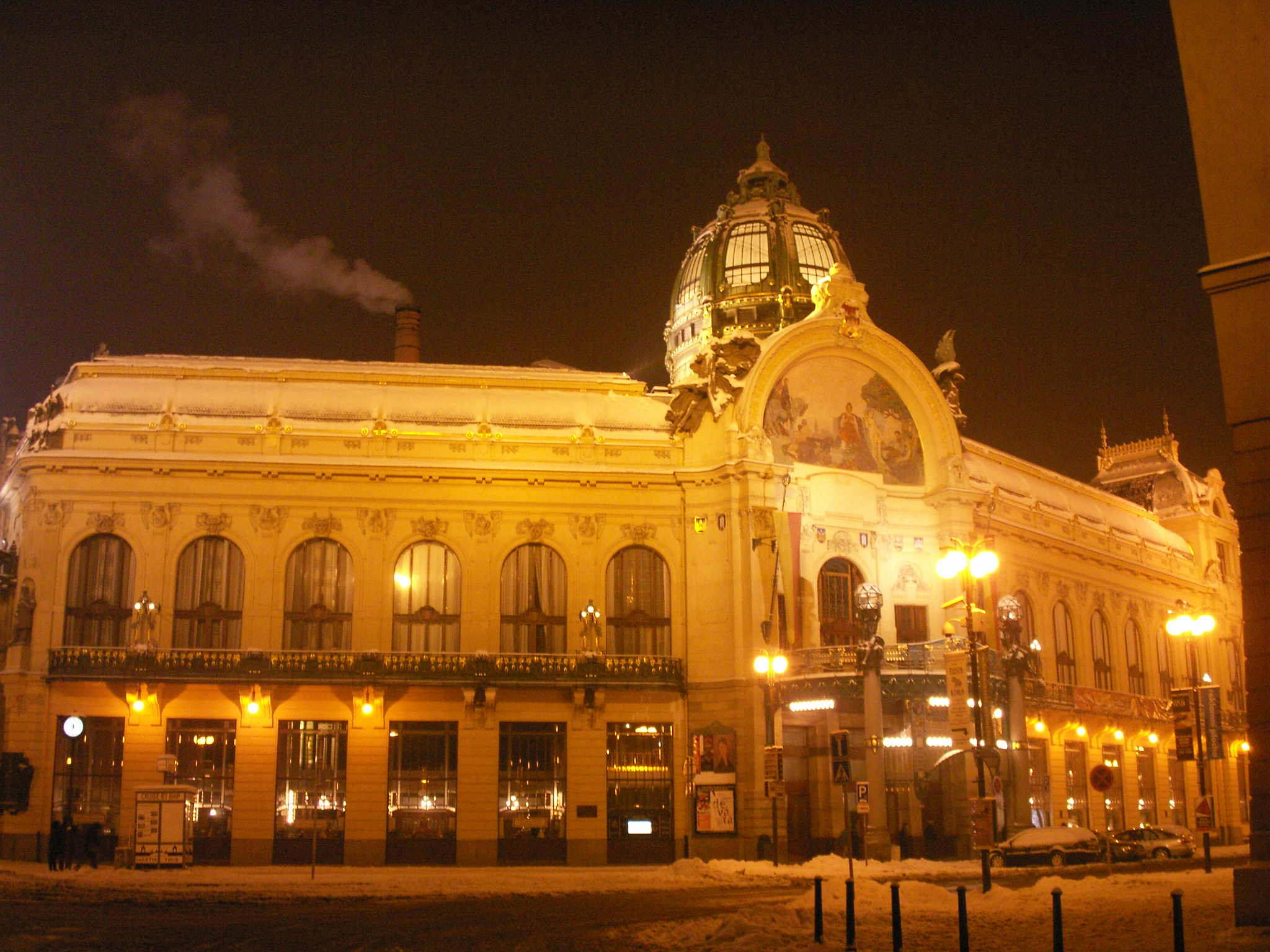 Façade de la Maison Municipale de Prague (Obecní dům - Tchéquie) de nuit